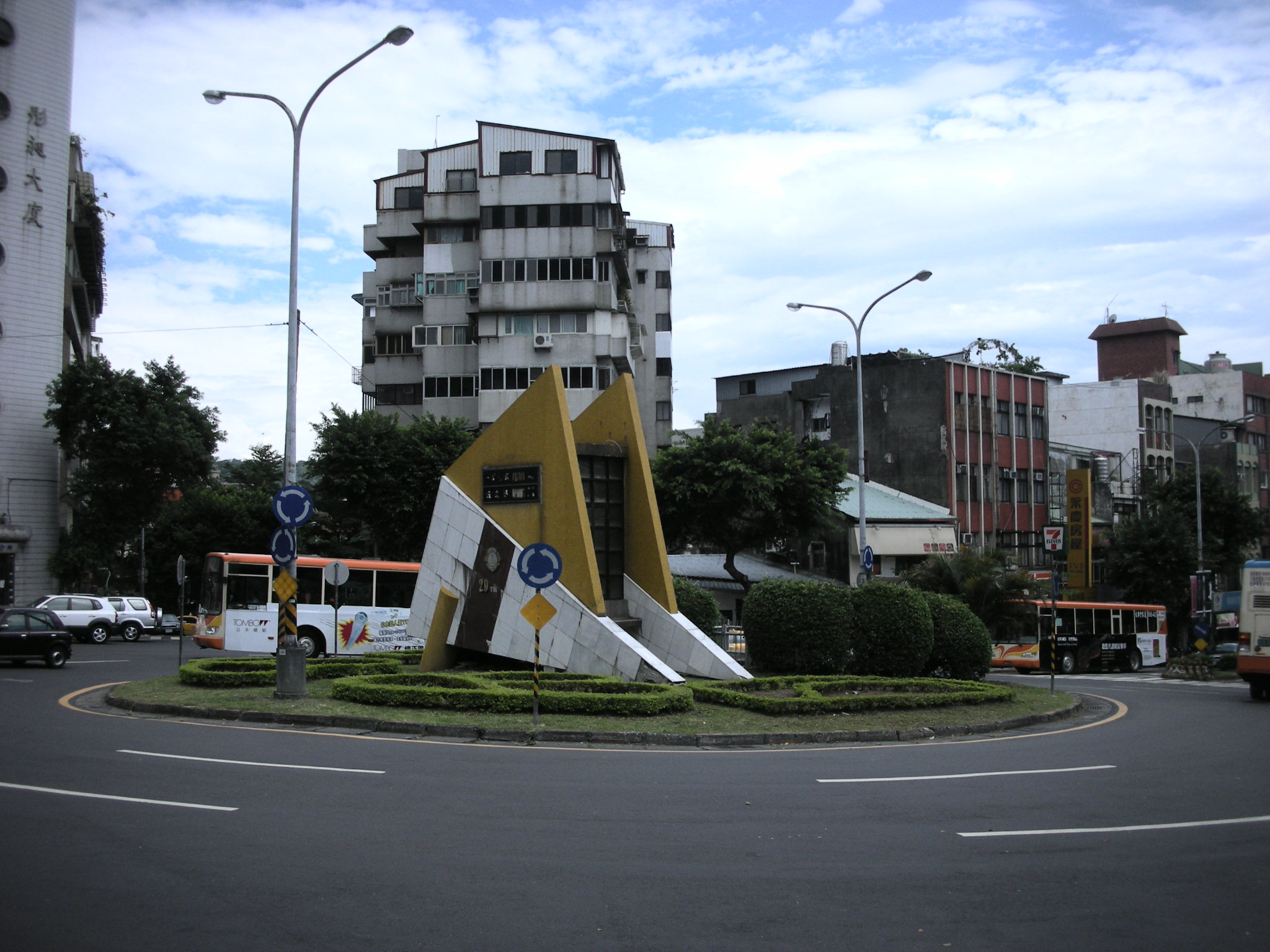 中山北路七段圓環